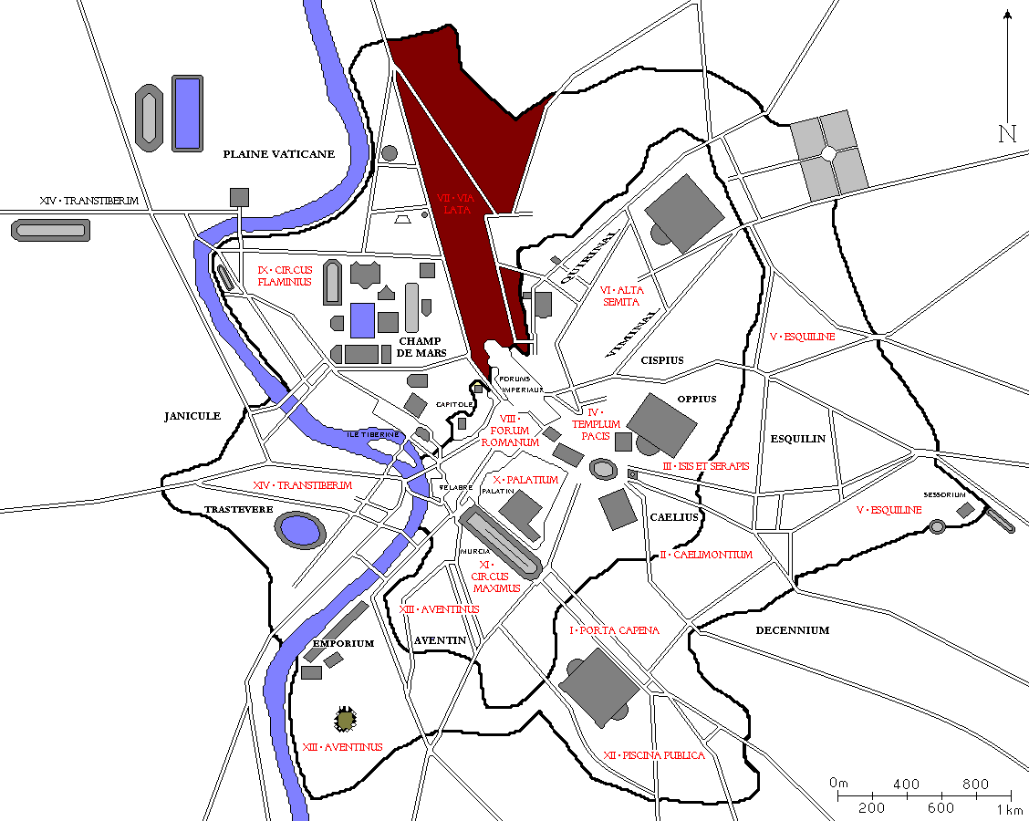 Plan de Rome avec la septième région des 14 régions d'Auguste